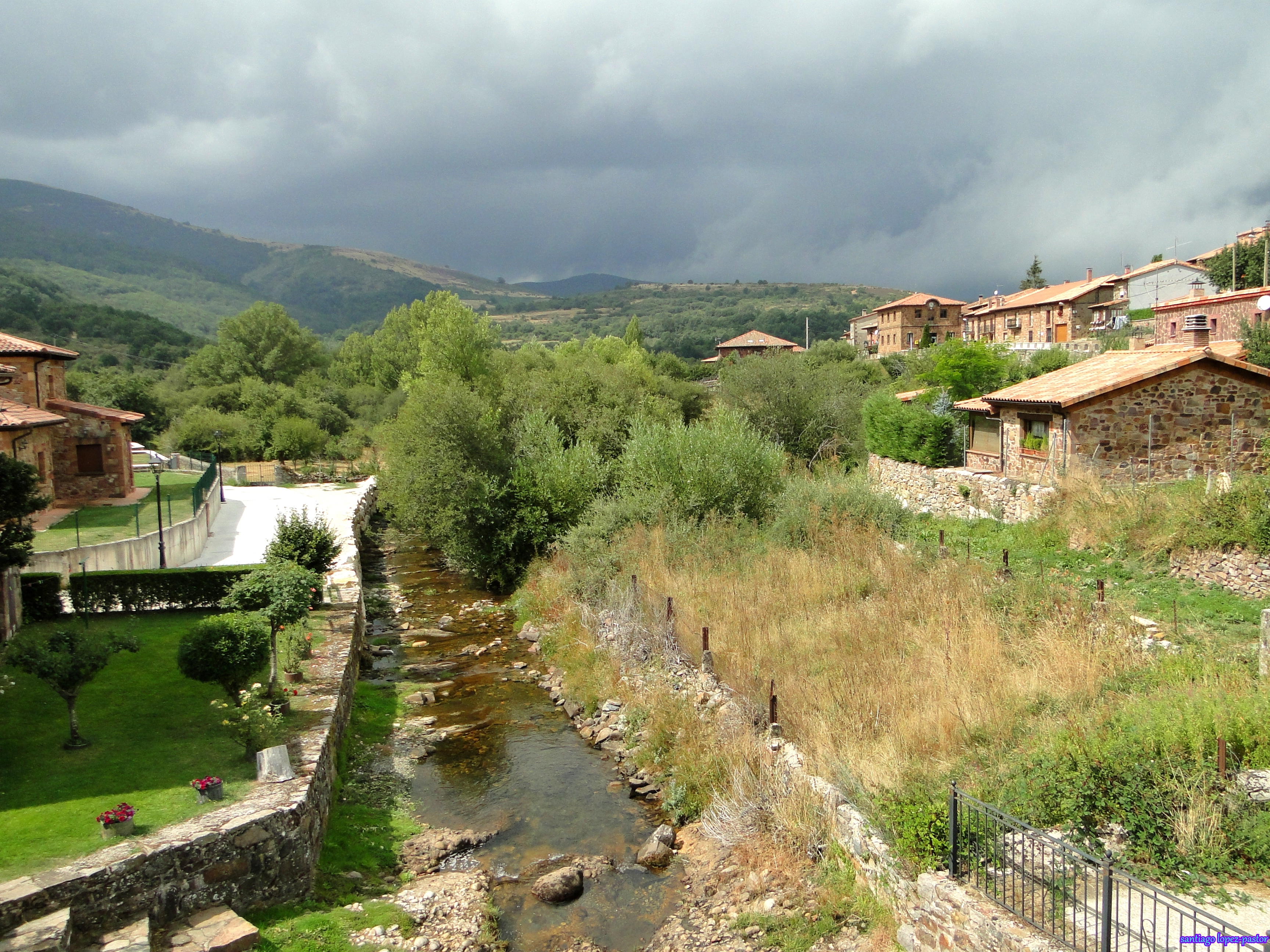 Pineda de la Sierra.